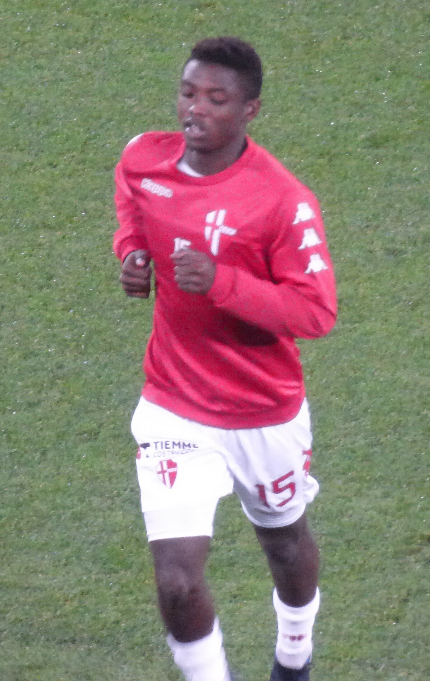 Jérémie Broh lors du match amical RC Lens - Calcio Padova, le 11 octobre 2018 au Stade Bollaert-Delelis de Lens.